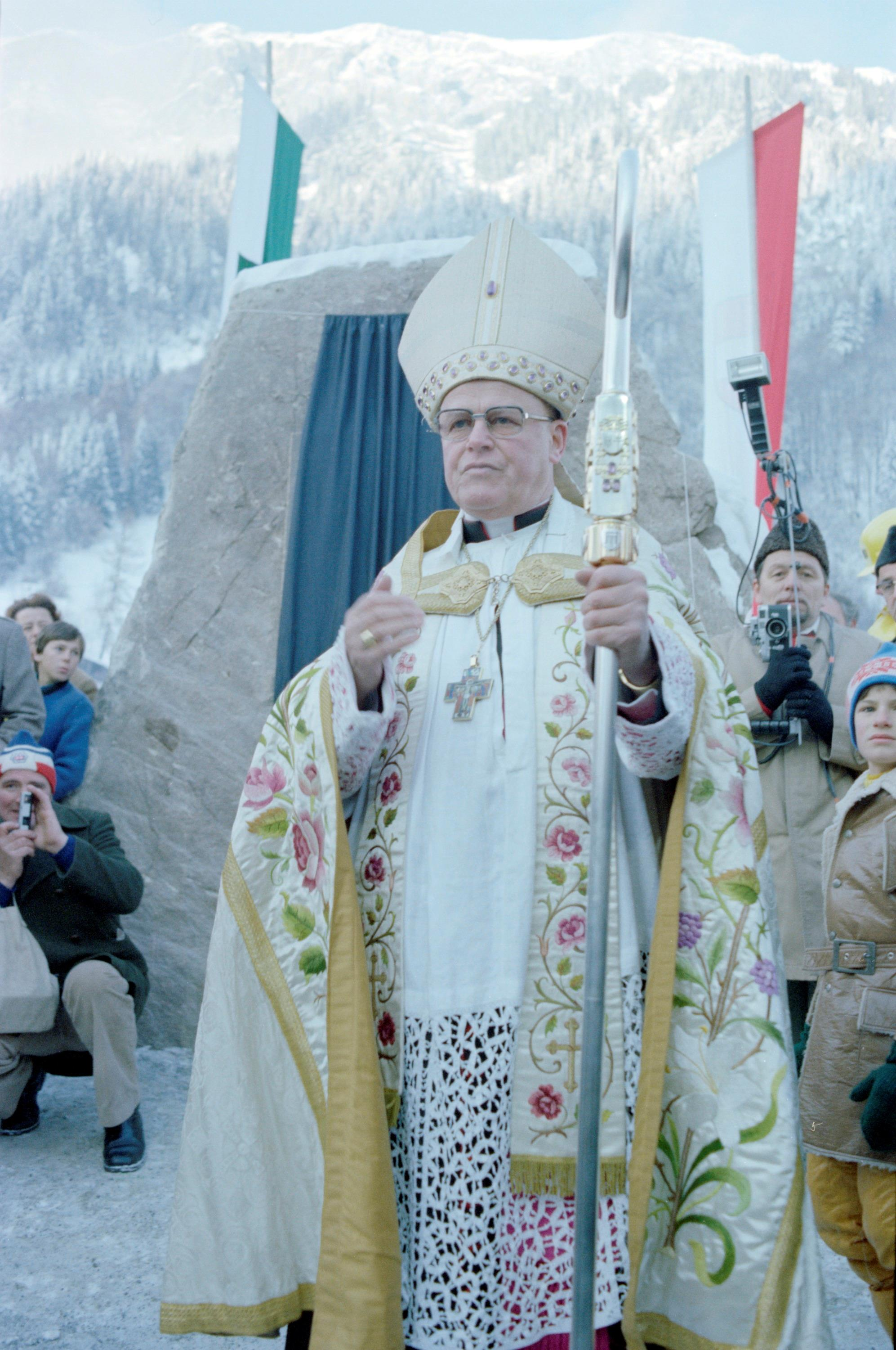 Bruno Wechner bei der Arlbergtunnel-Eröffnung in Klösterle